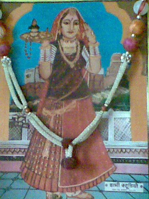 Mata Rani Bhatiyani sa